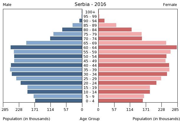 A population pyramid illustrates the age and sex structure of a country's population and may provide insights about political and social stability, as well as economic development. The population is distributed along the horizontal axis, with males shown on the left and females on the right. The male and female populations are broken down into 5-year age groups represented as horizontal bars along the vertical axis, with the youngest age groups at the bottom and the oldest at the top. The shape of the population pyramid gradually evolves over time based on fertility, mortality, and international migration trends.